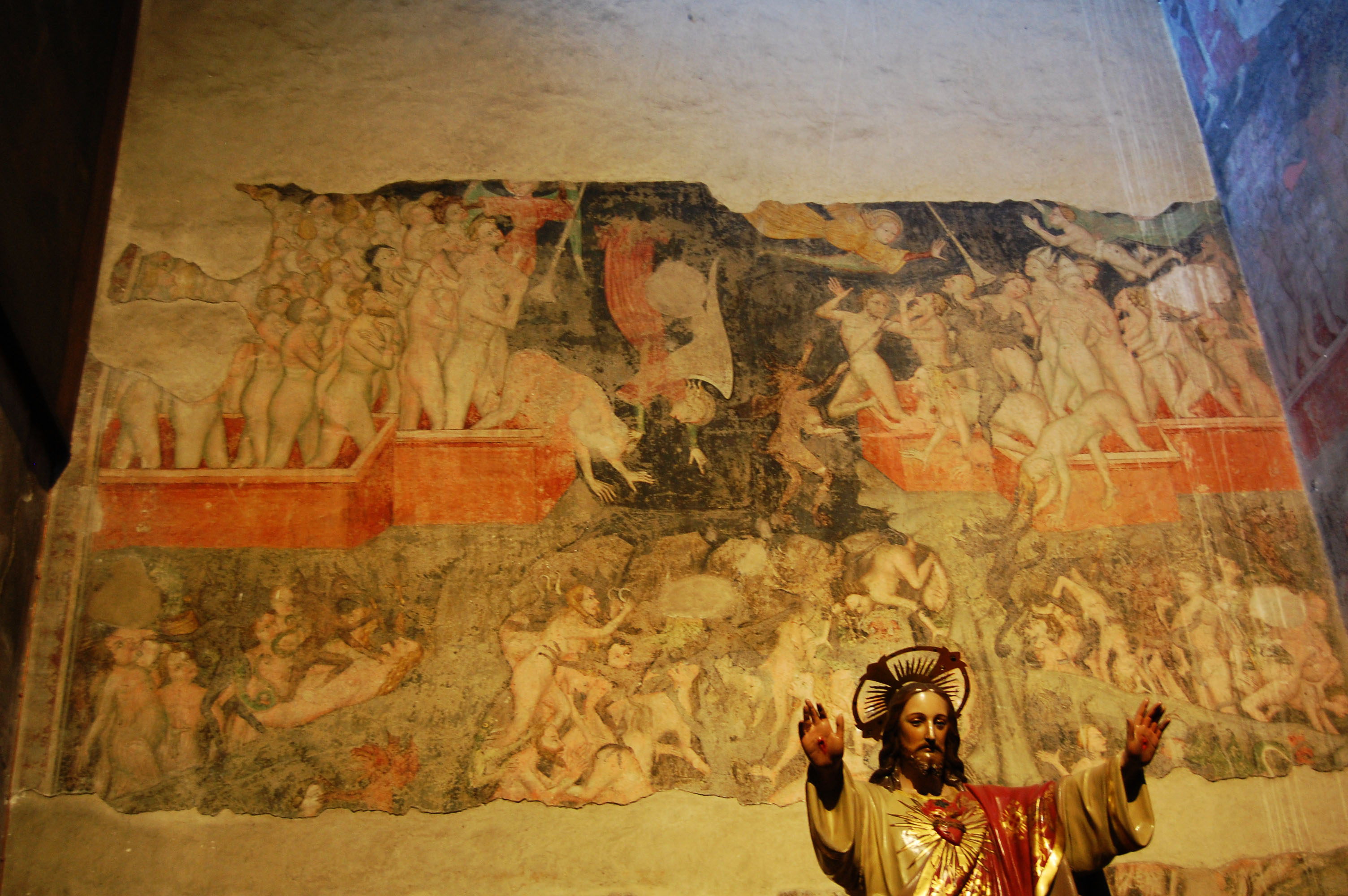 Affresco sul Giudizio Universale, risalente al XV secolo e situato nel Duomo di Lodi.